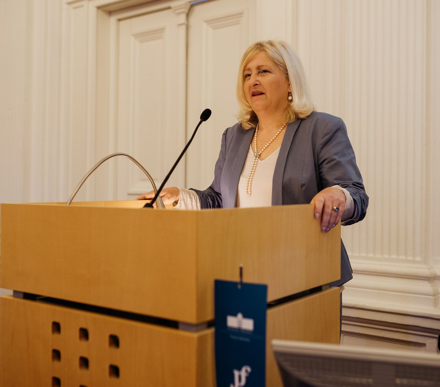 dr. Vesna Rijavec, dekanja Pravne fakultete Univerze v Mariboru